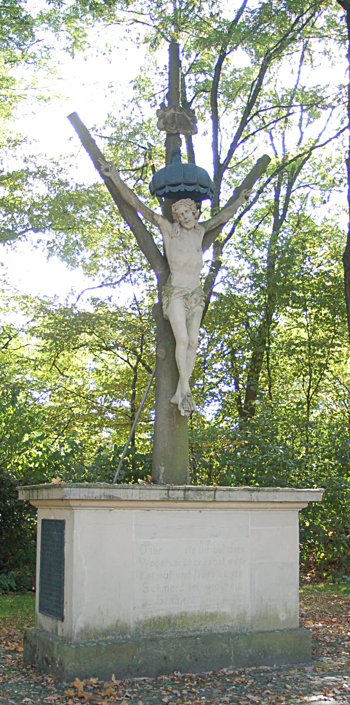 Das "Coesfelder Kreuz" in Münster, Westfalen, frontal aufgenommen.